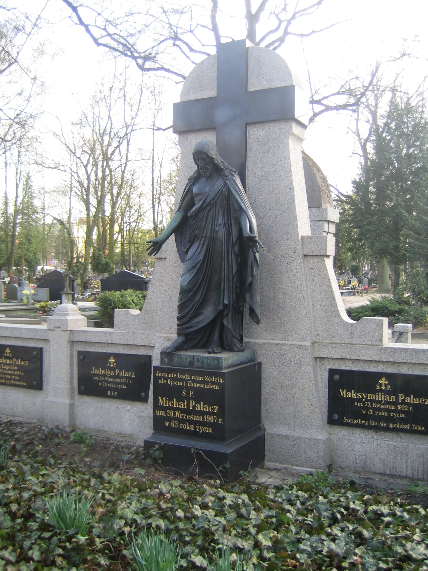 Grobowiec Palaczów na cmentarzu na Jeżycach